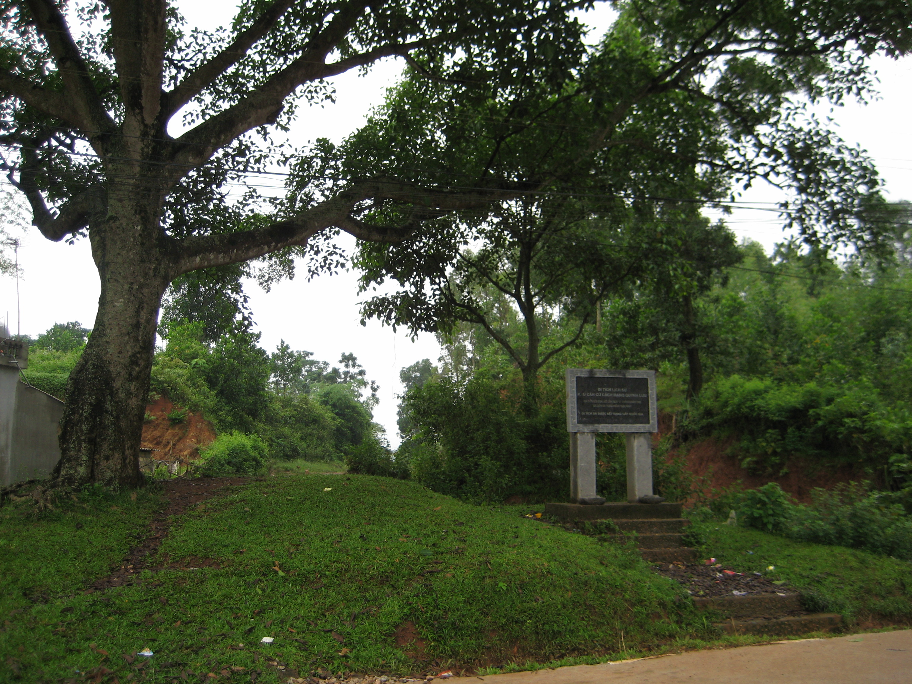 Cây đa ở Chiến khu Quỳnh Lưu ở Nho Quan, Ninh Bình